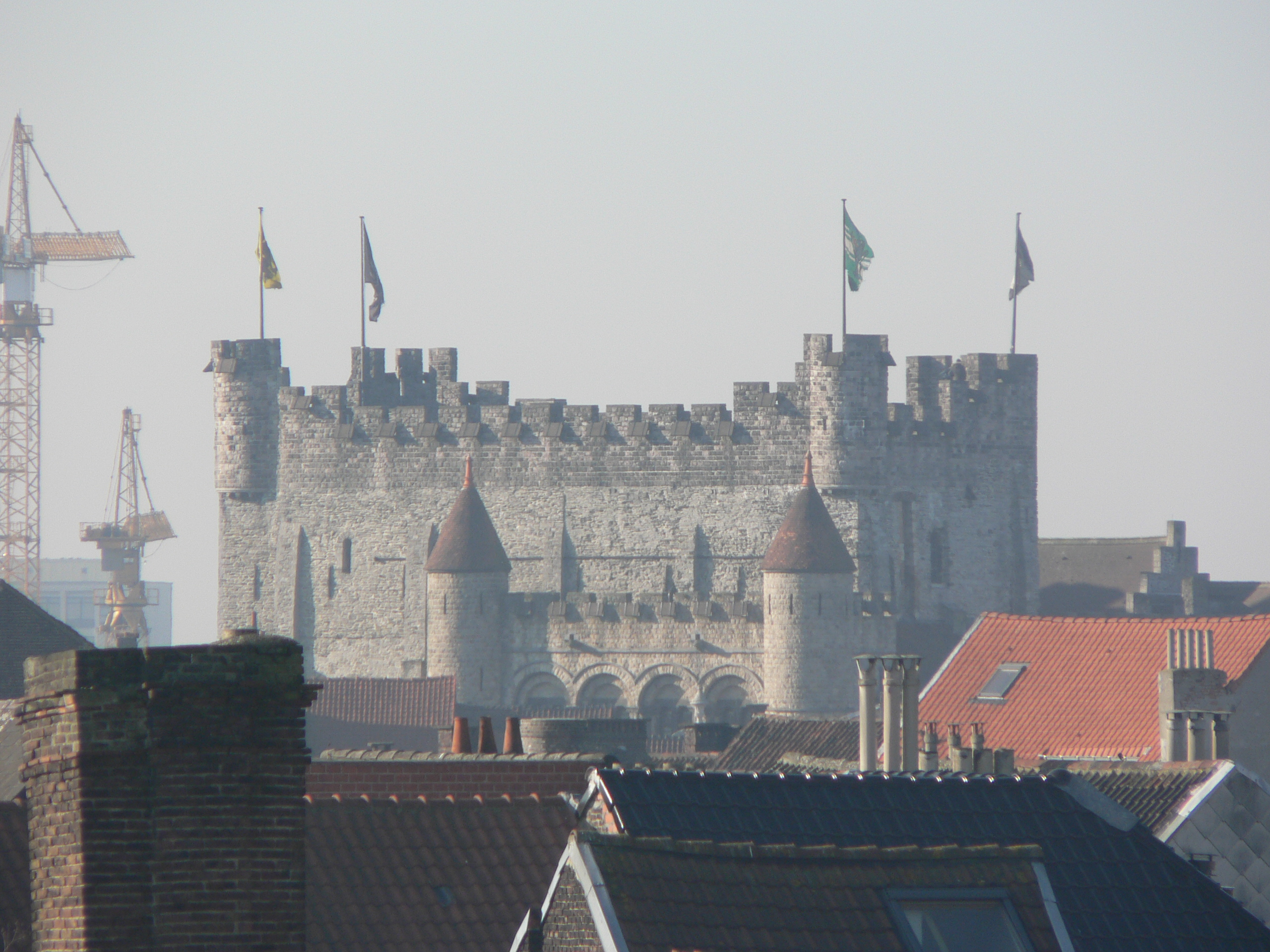 Gravensteen middle age castle, Gent, Belgium